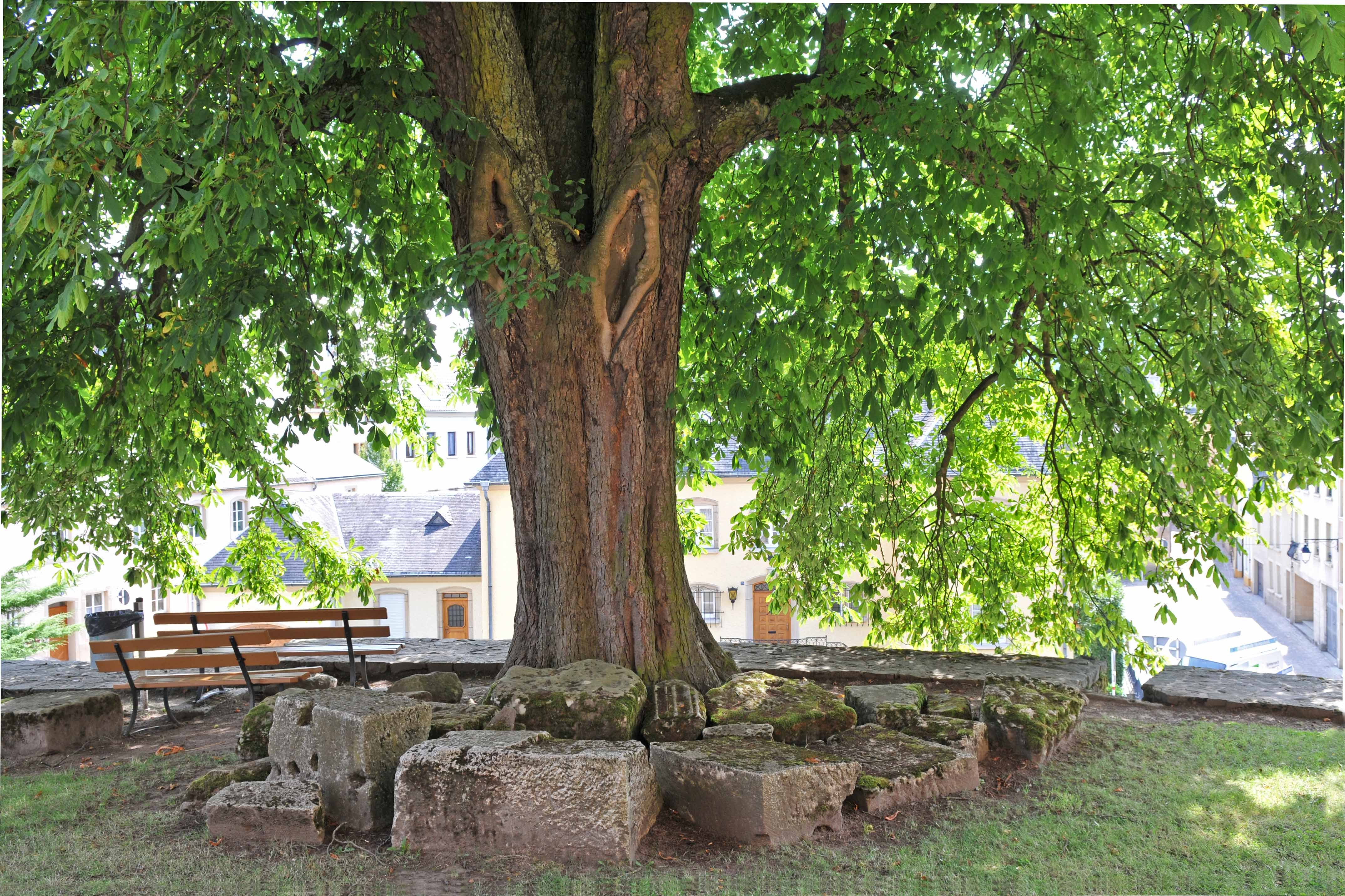 Bemierkenswäerte Käschtebam bei der Péitrus a Paulus-Kierch zu Iechternach. + Kategorie:Gemeng Iechternach